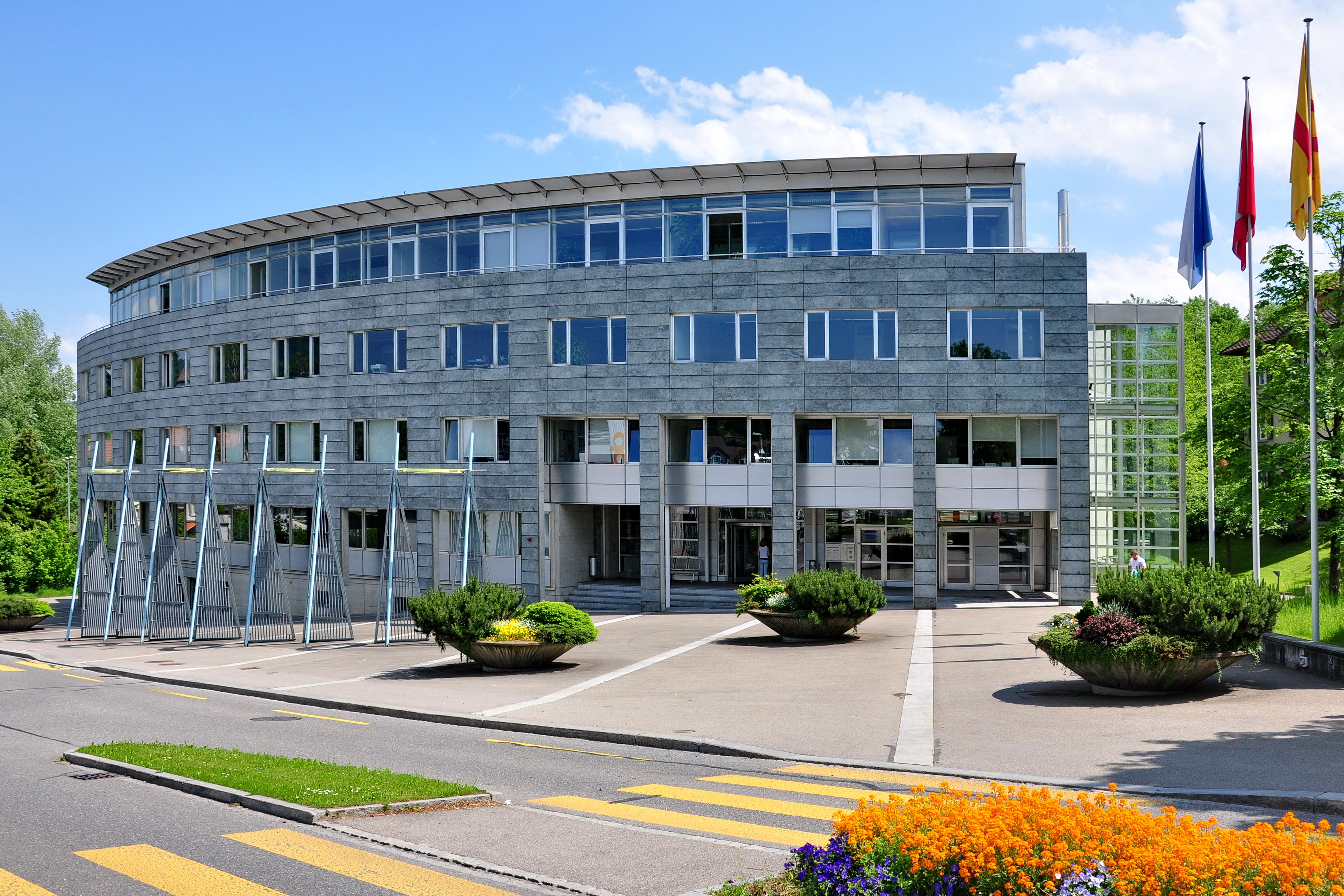 Gemeindeverwaltung at Bandwiesstrasse in Rüti (ZH)